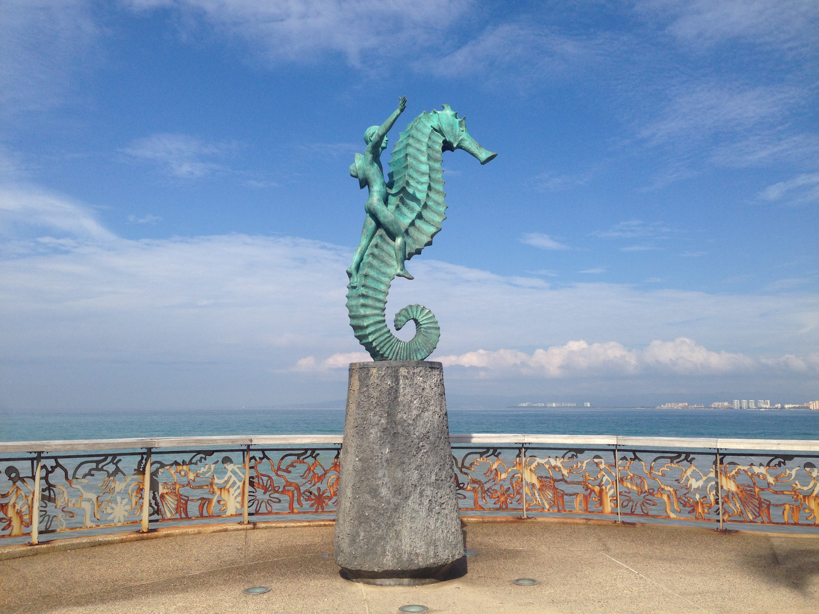 Puerto Vallarta, Malecón, escultura del caballito de mar, ícono representativo de Puerto Vallarta.